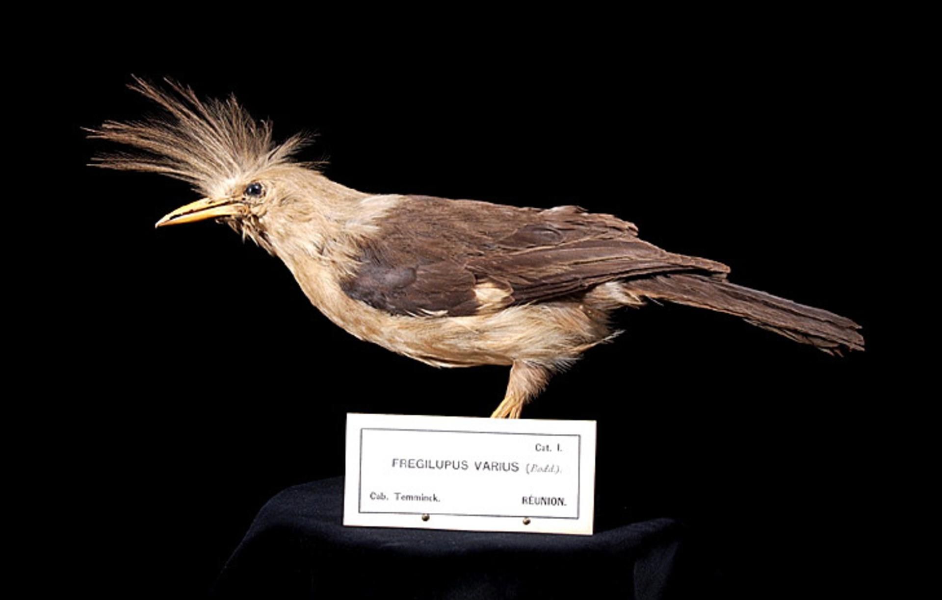 Fregilupus varius (Boddaert, 1783)